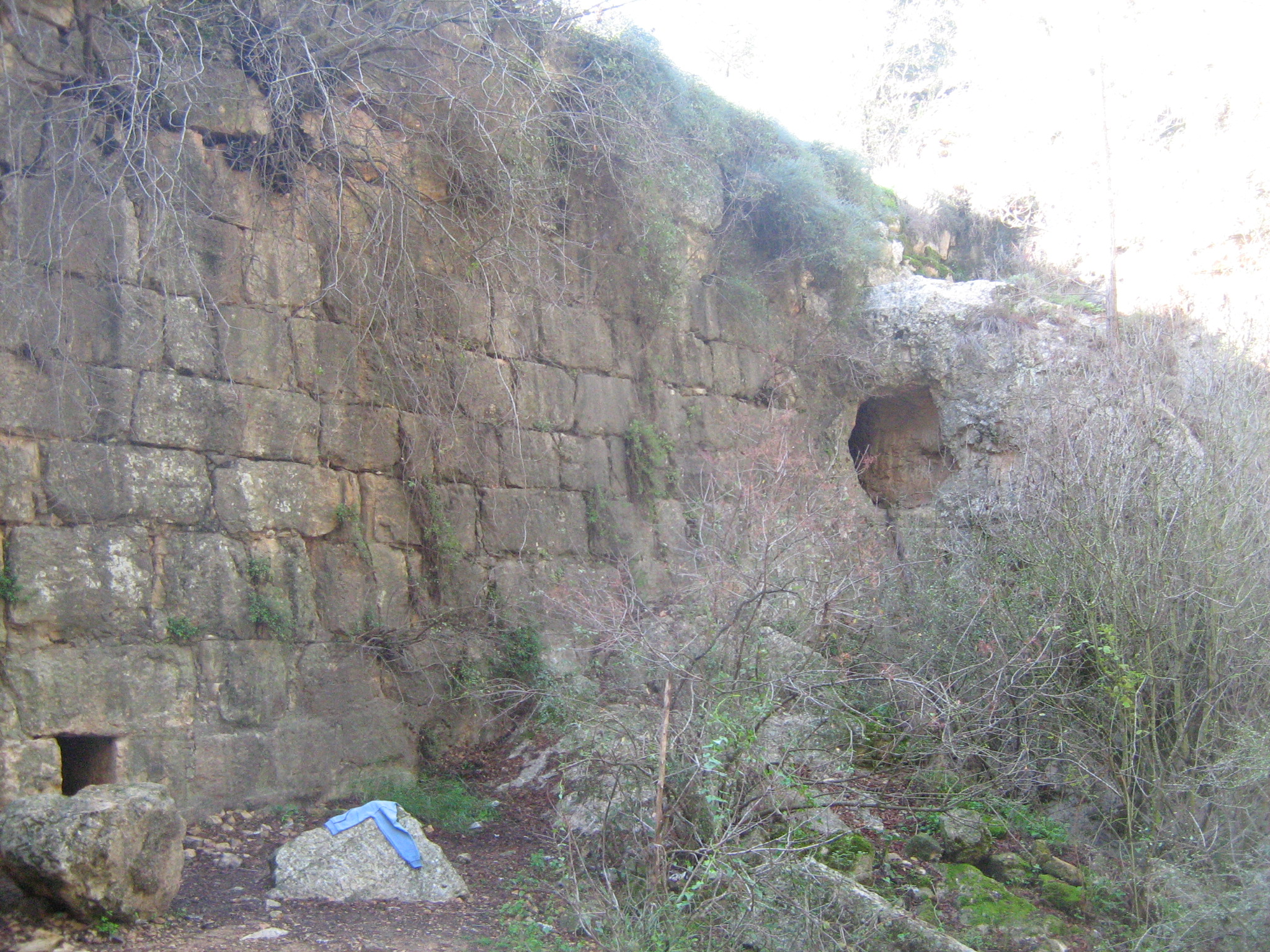 עין חנדק - הכותל הקטן